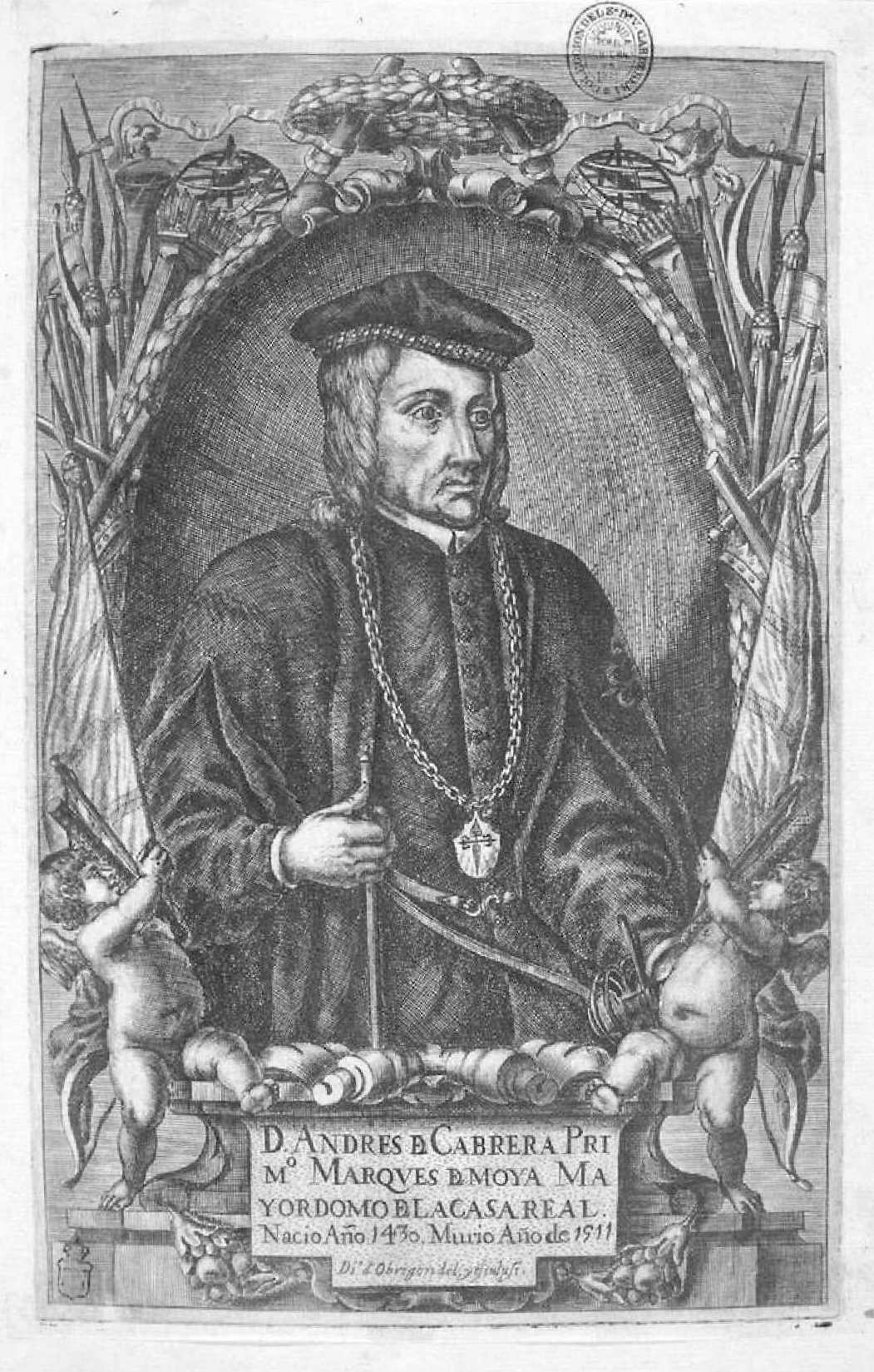 Retrato de Andrés de Cabrera, aguafuerte dibujado y grabado por Diego de Obregón para el libro de Francisco Pinel y Monroy, Retrato del buen vasallo, Madrid, 1677